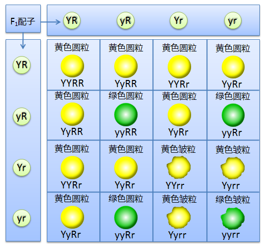 中文（中国大陆）: 基因的自由组合定律两对相对性状的试验图析